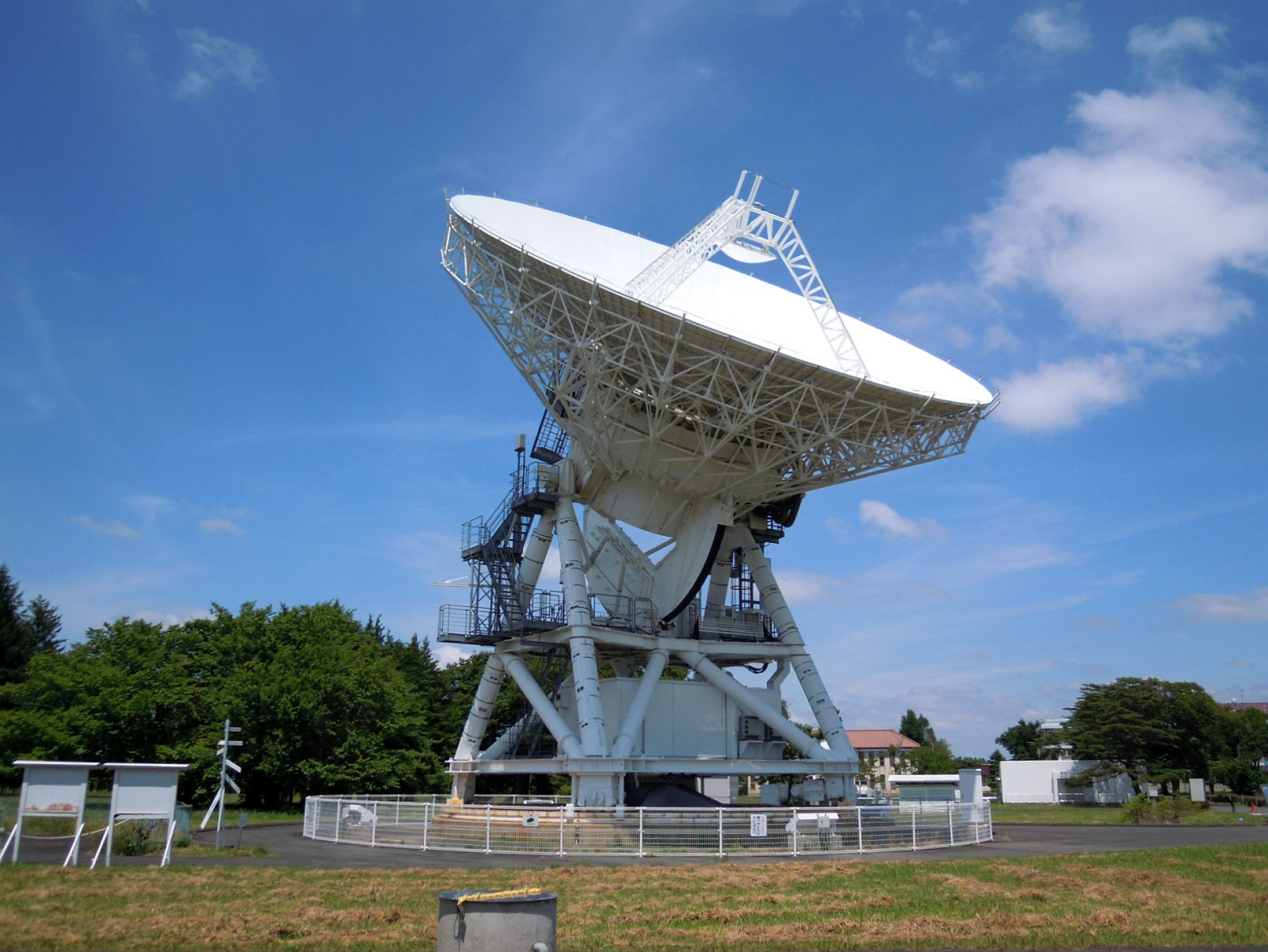 岩手県奥州市の水沢VLBI観測所内にある20mアンテナ